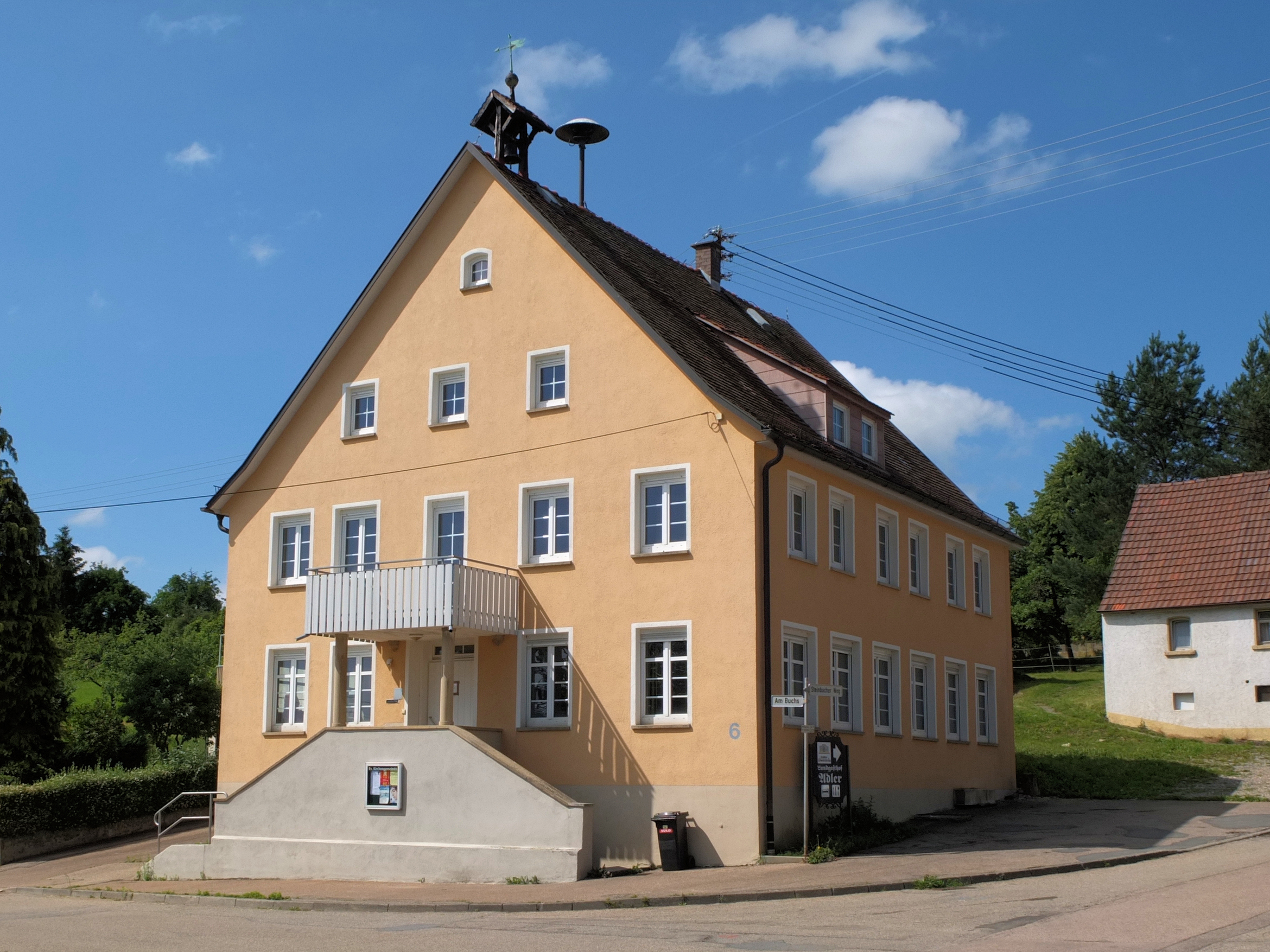 Altes Schulhaus in Künzelsau-Garnberg